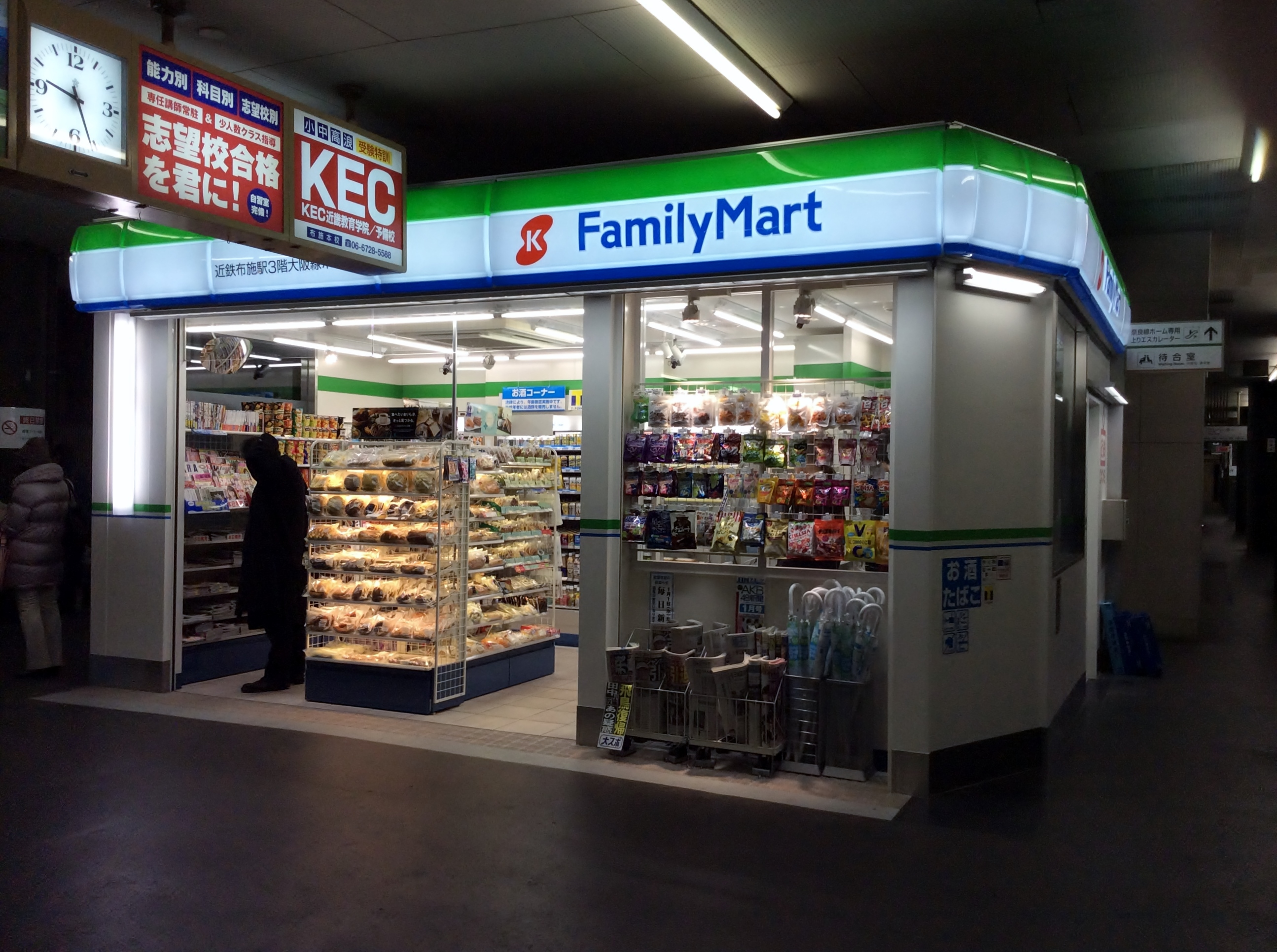 近鉄エキファミ布施駅3階大阪線ホーム店を撮影。